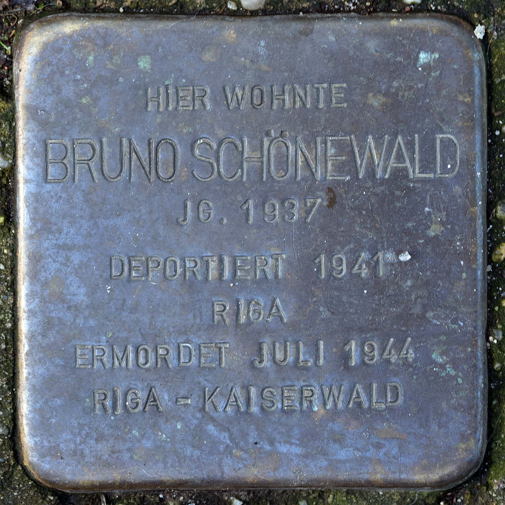 Stolperstein für Schoenewald Bruno